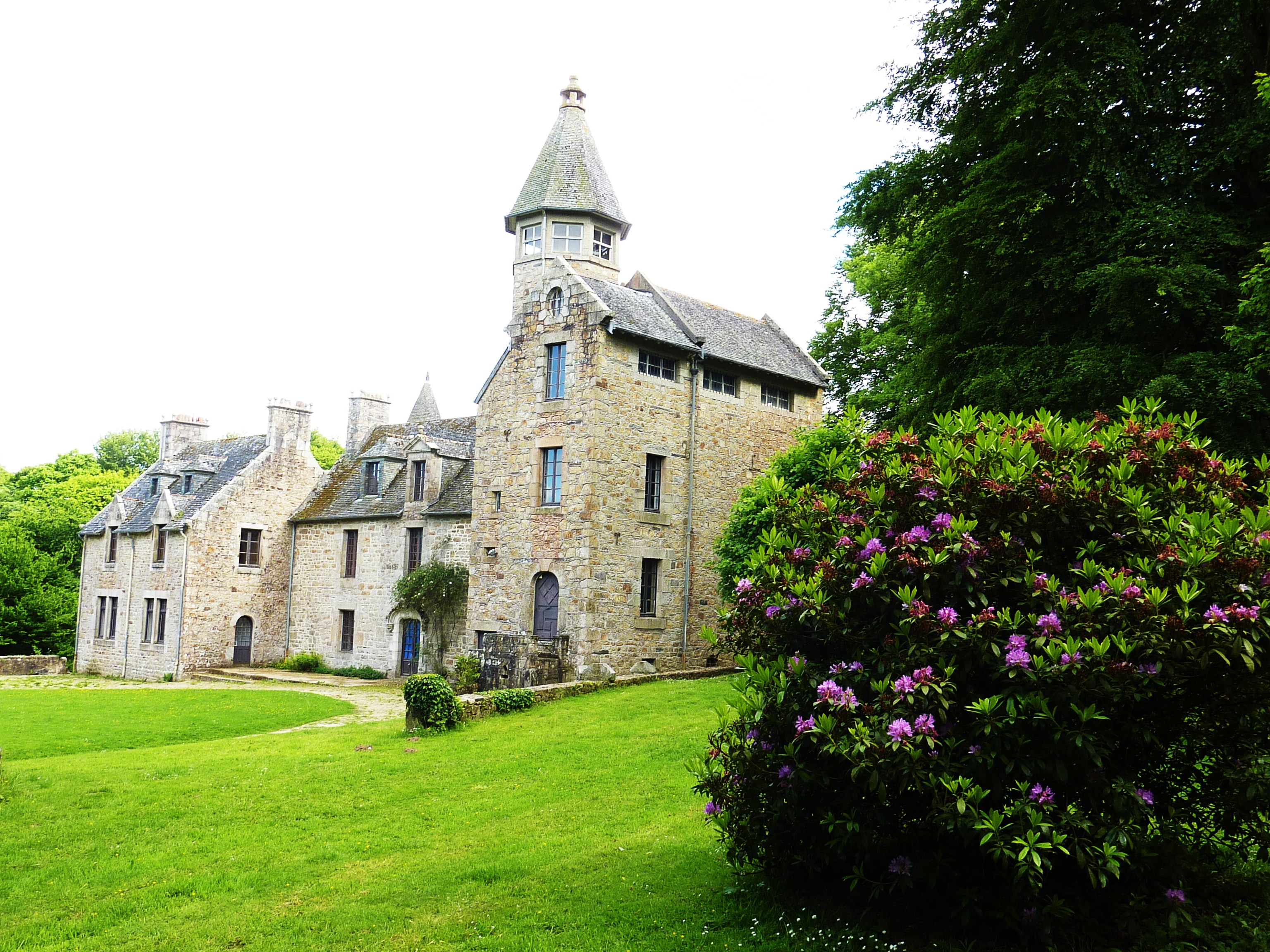 Ploujean château de Suscinio (maison Cornic) façade nord